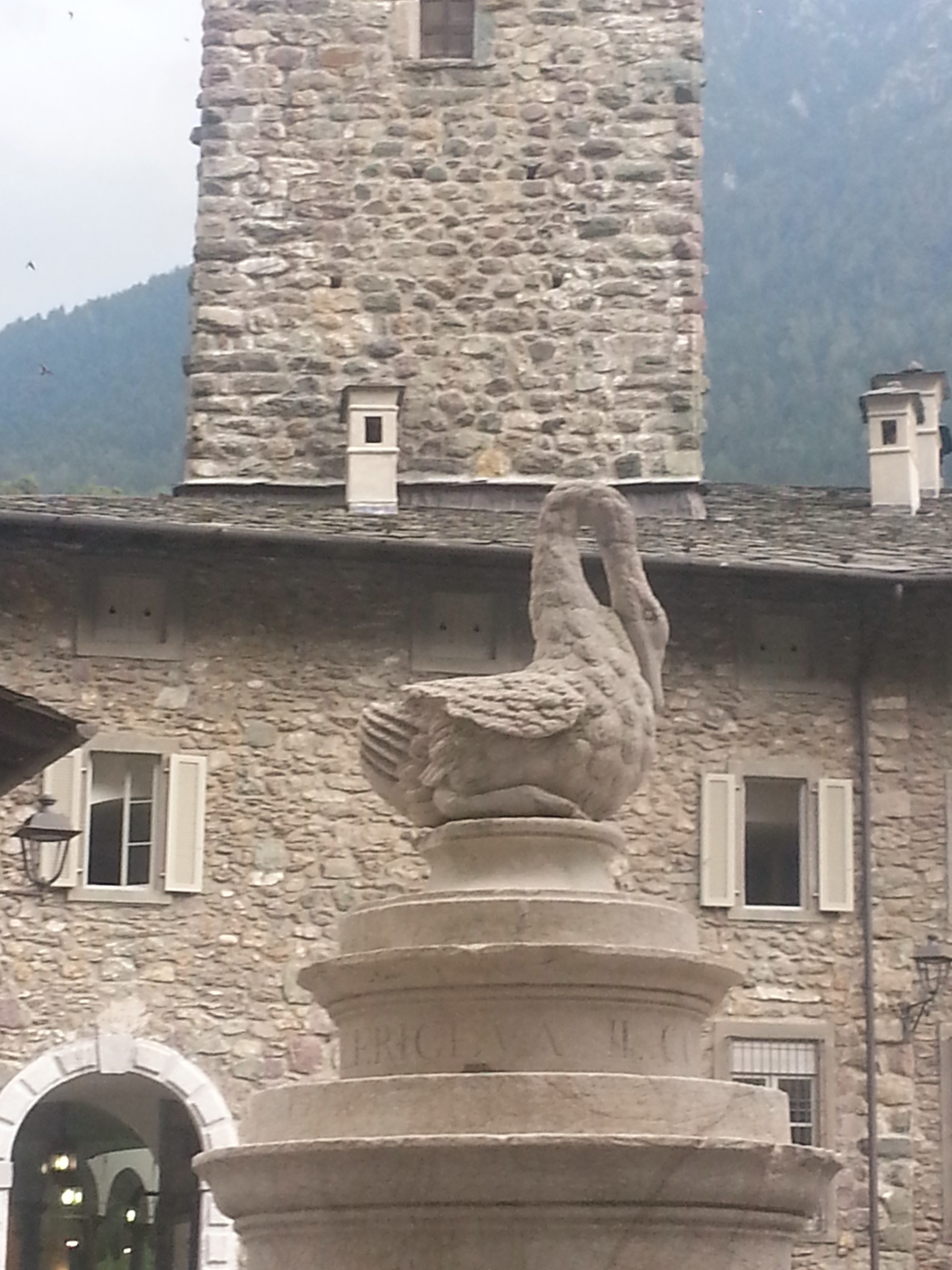 Stemma del cigno sopra la fontana quattrocentesca, e castello Ginami Buccelleni con torre.